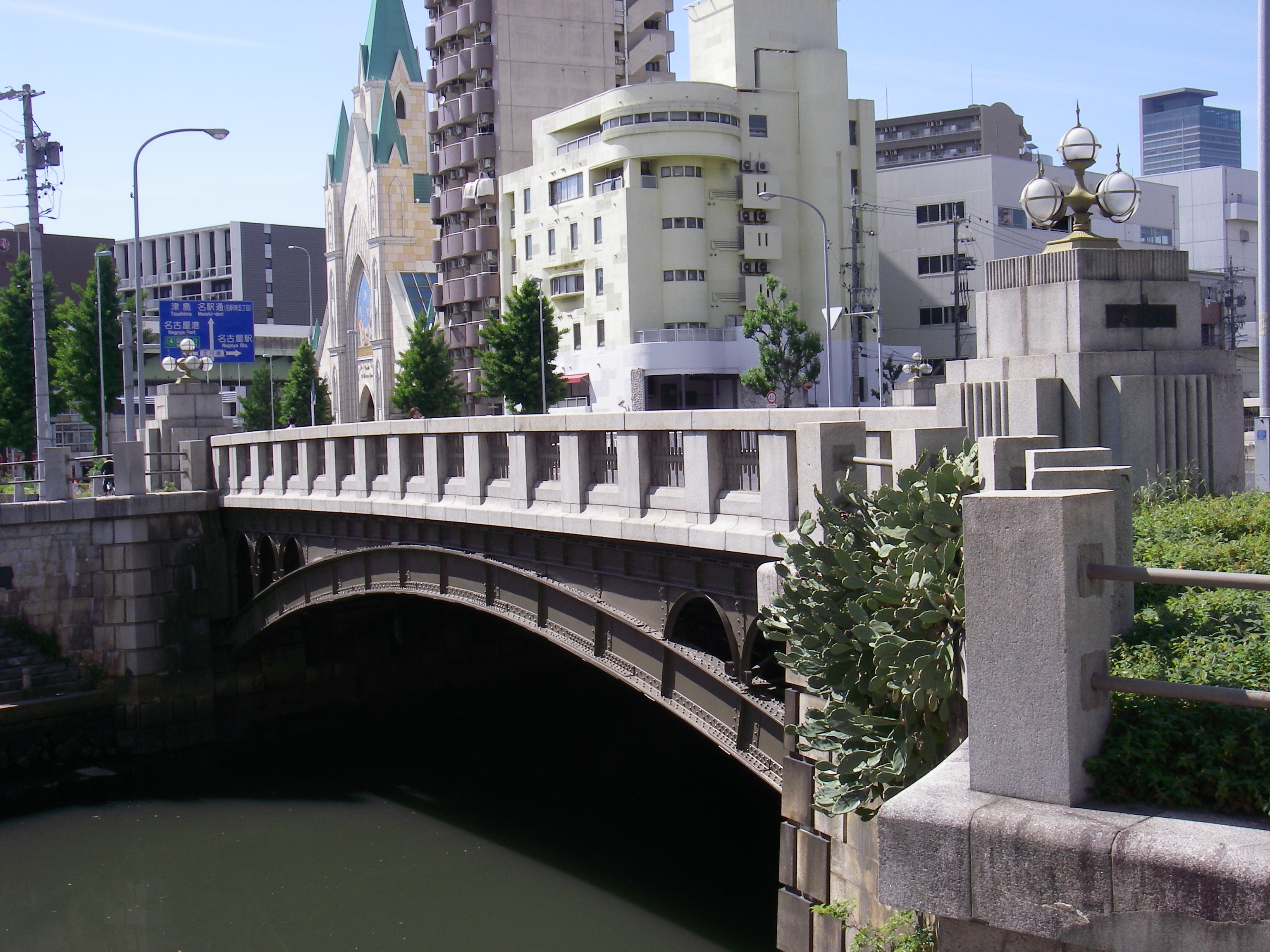 岩井橋（愛知県名古屋市） 大須通が堀川を越える橋。